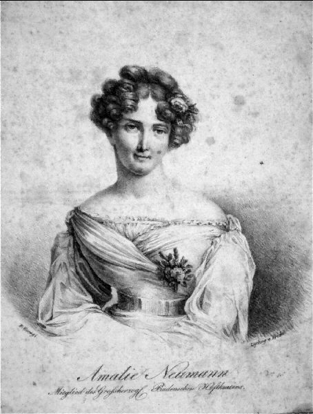 Amalie Haizinger 1800-1884), deutsche Shauspielerin. Lithographie von Friedrich August Fricke, nach F. Georgi, um 1830